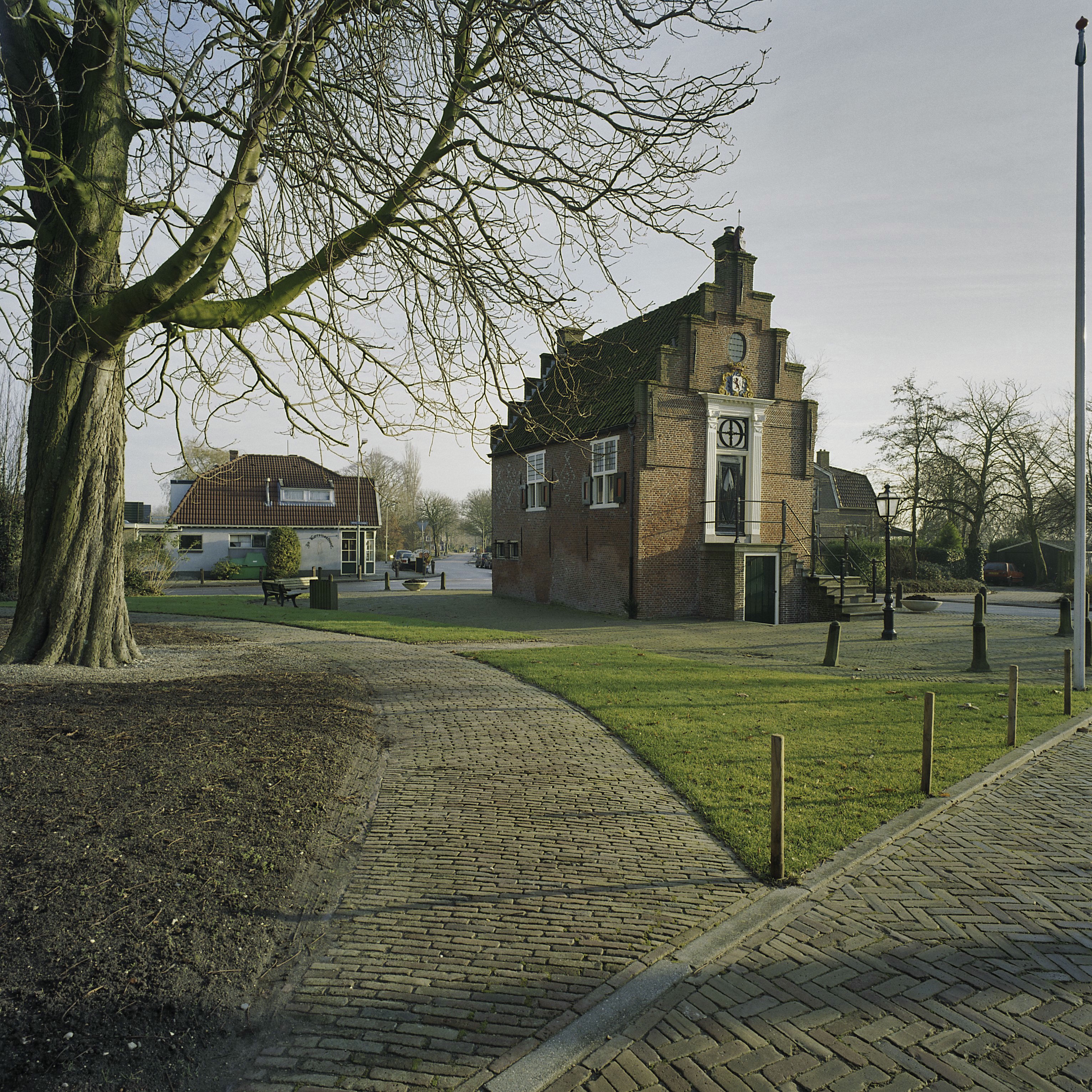 Voormalige raadhuis: Overzicht voorgevel, met bordestrap, en linker zijgevel (opmerking: Gefotografeerd voor Monumenten In Nederland Noord-Holland)